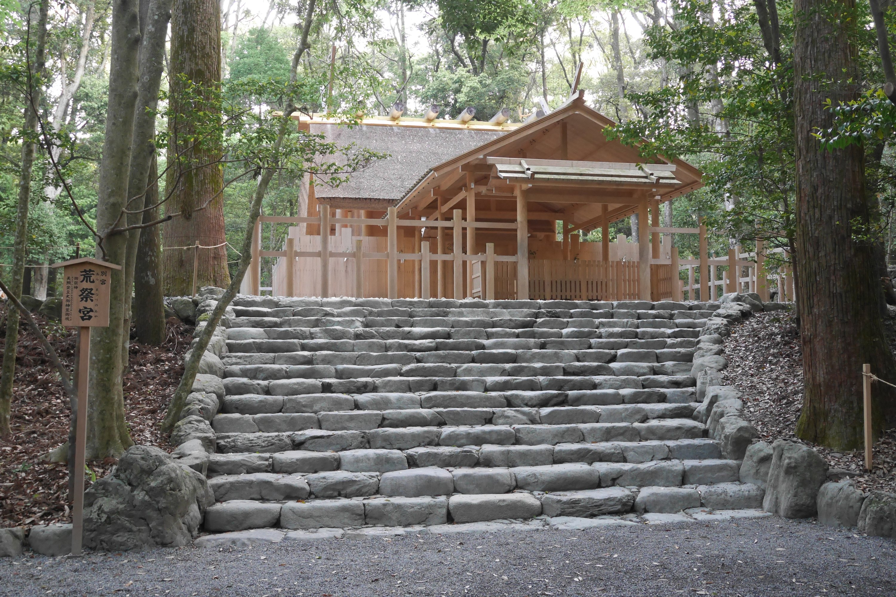 日本の三重県伊勢市にある皇大神宮別宮荒祭宮。